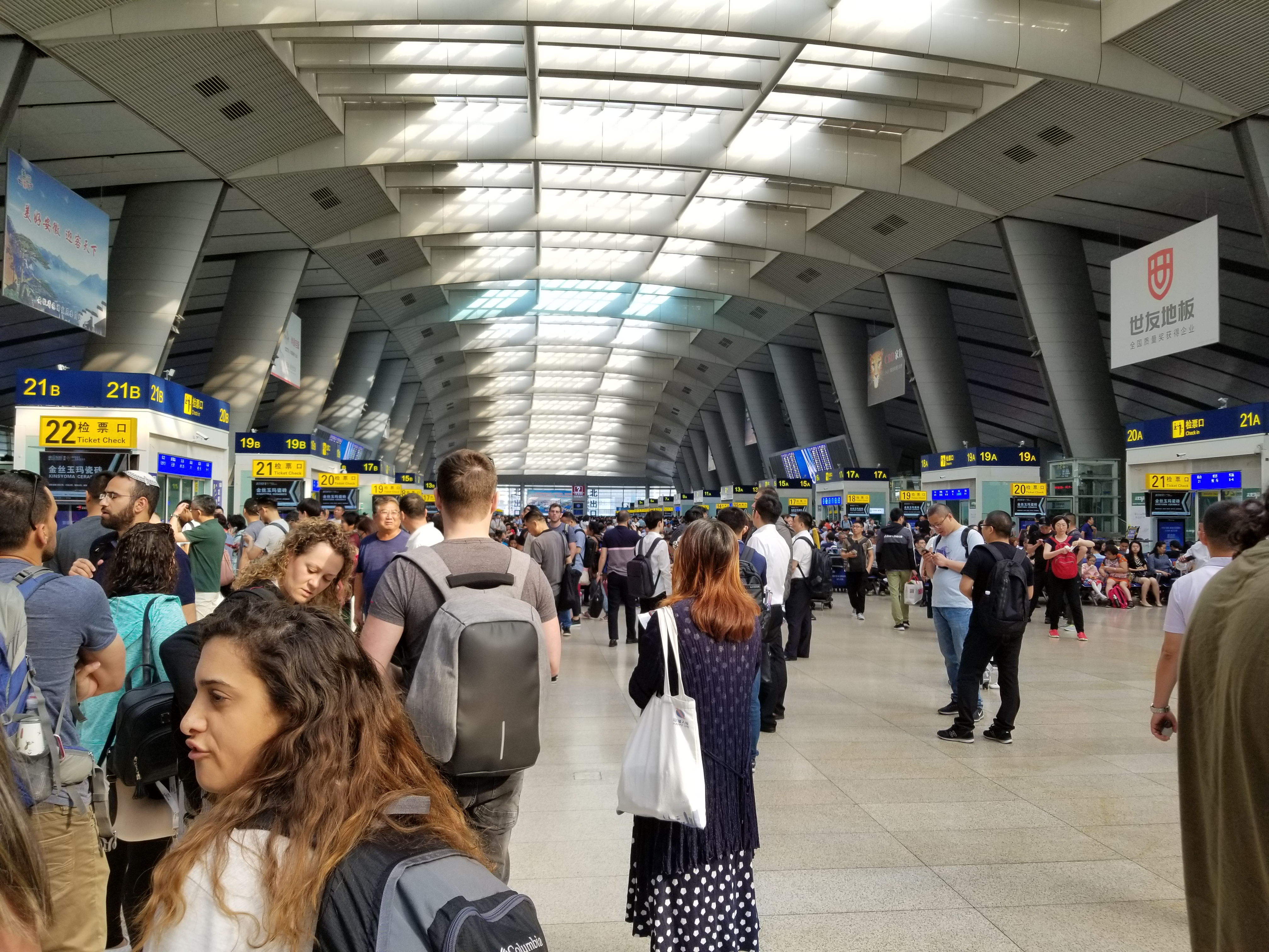 תחנת הרכבת דרום בייג'ינג